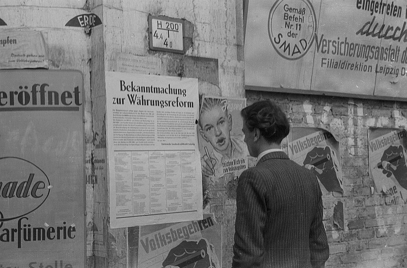 Original image description from the Deutsche FotothekEin Mann liest ein Plakat zur Währungsreform